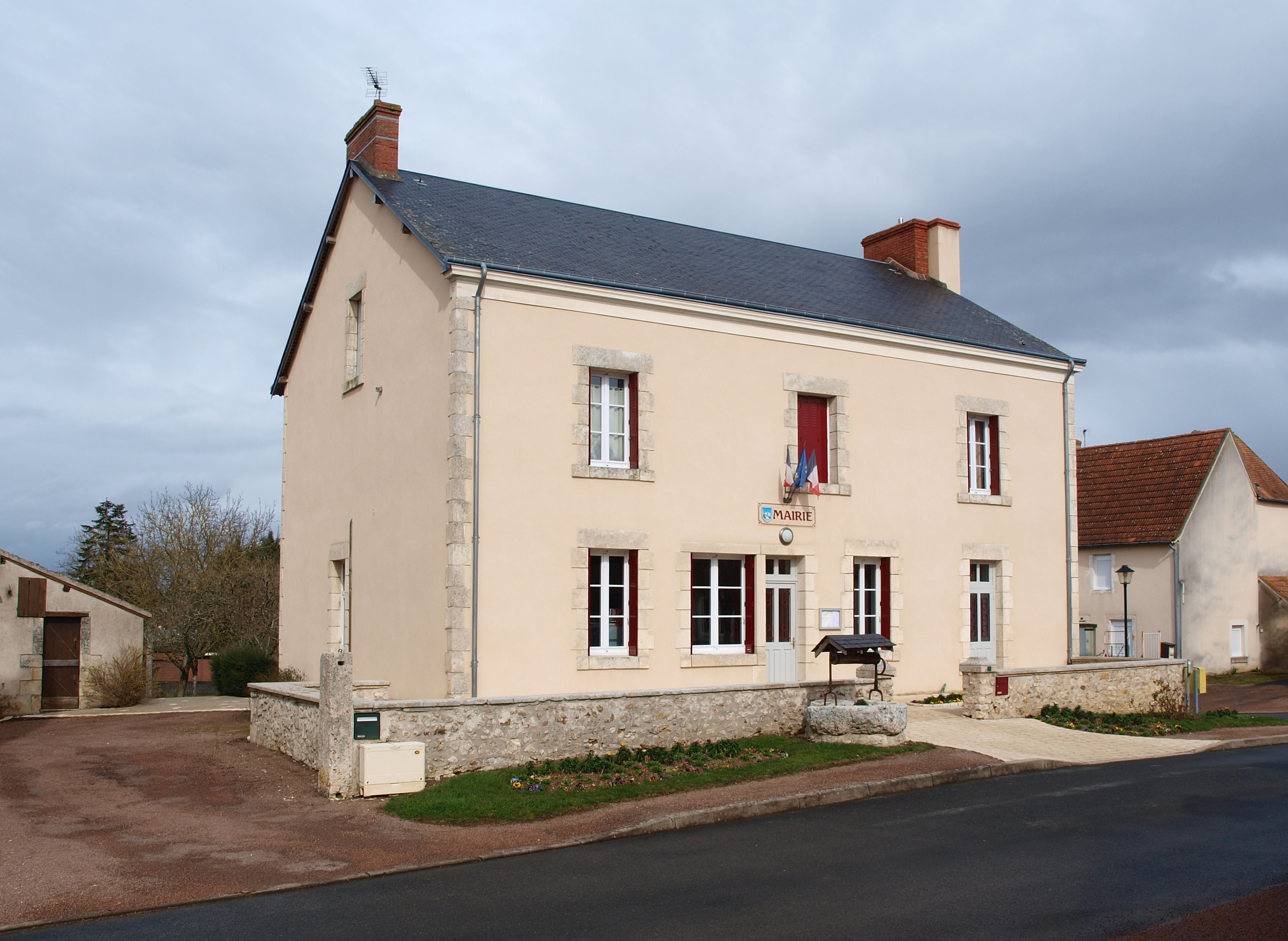 Jeu-les-Bois (Indre, France)